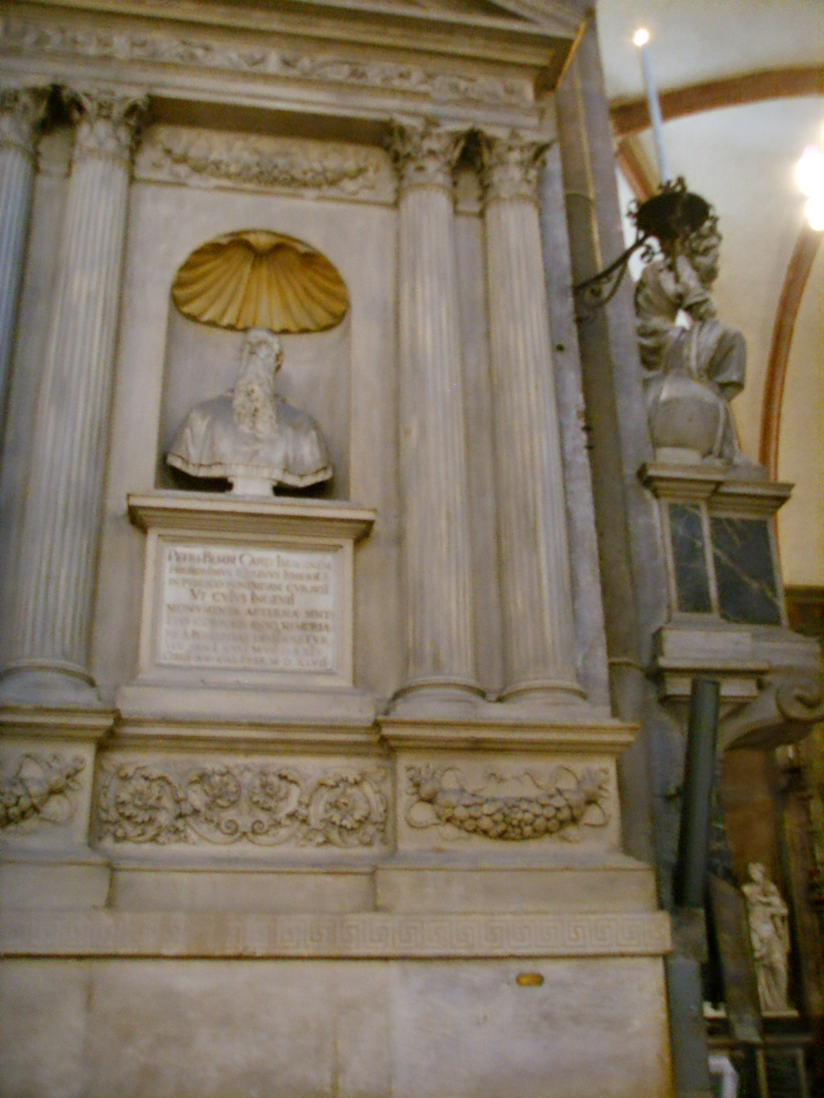 Padova, basilica del santo, navata destra, columna quarta est, monumento a Pietro Bembo